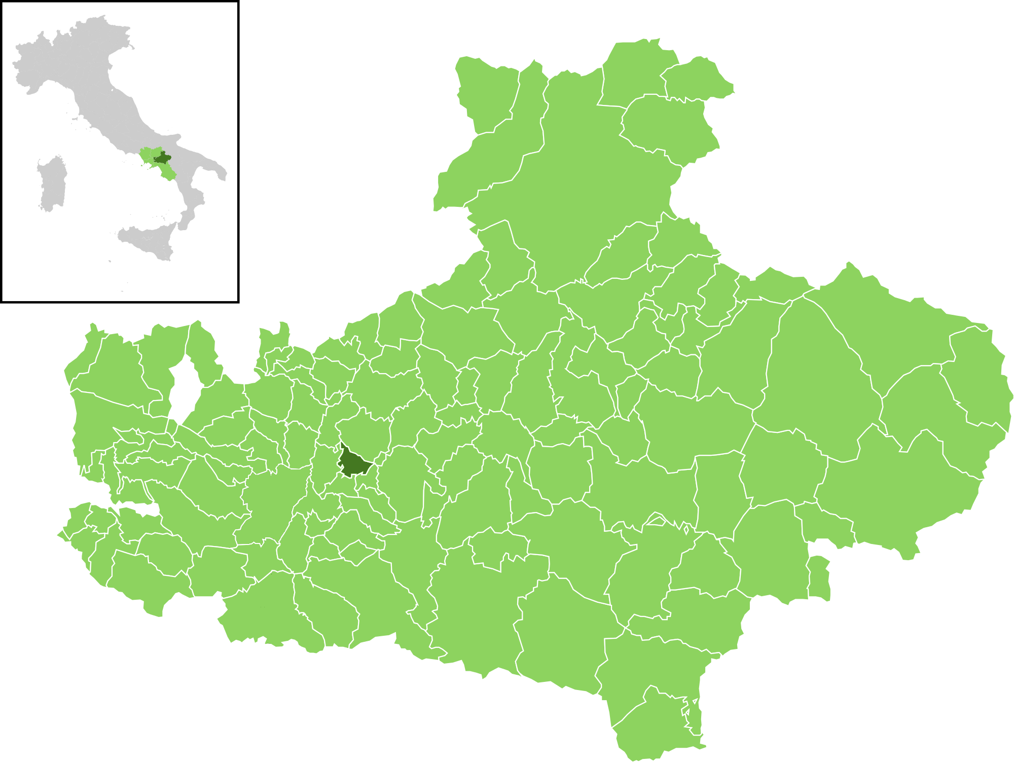 Il comune all'interno della provincia di Avellino